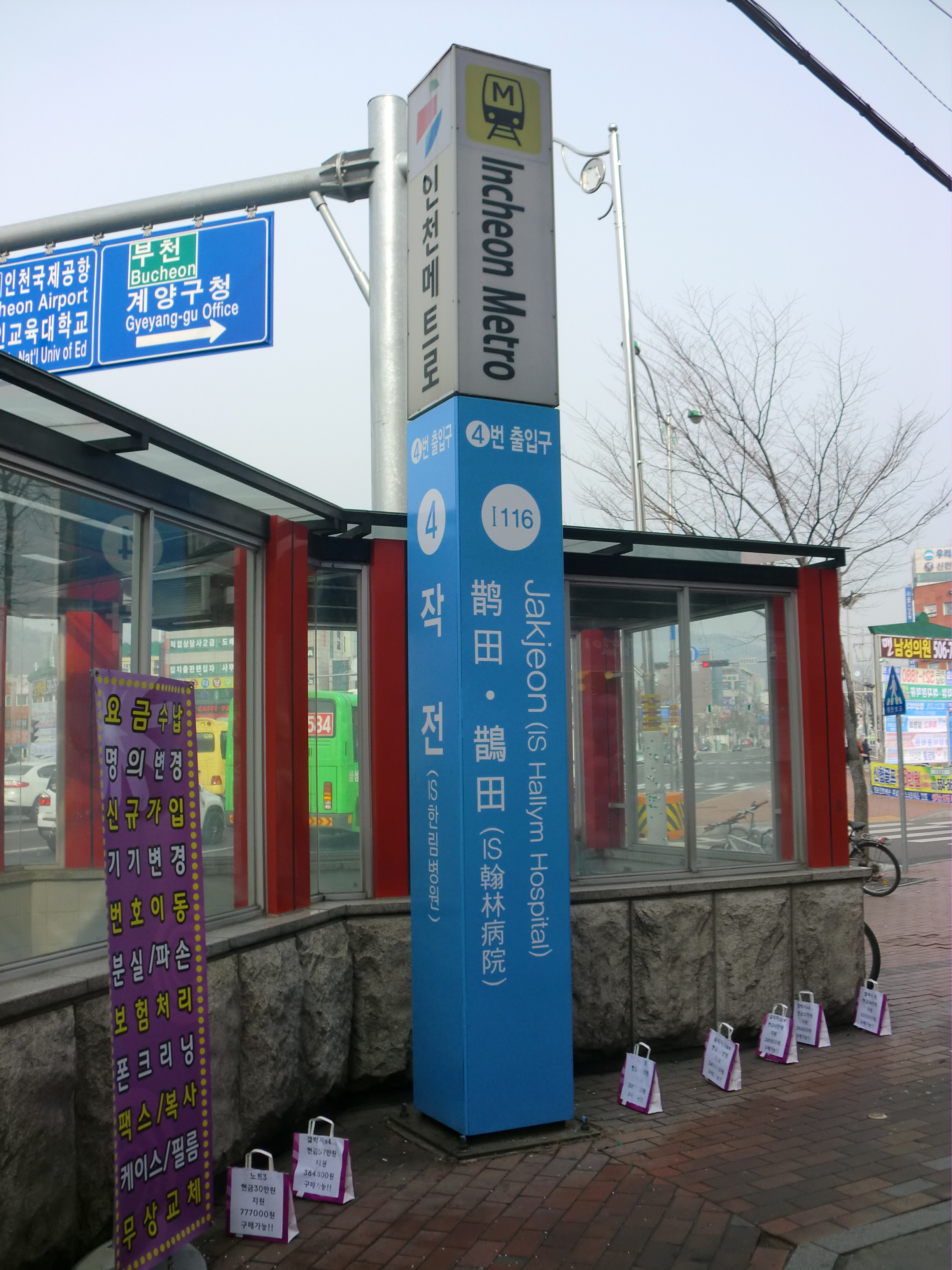 인천도시철도 작전역 4번출입구